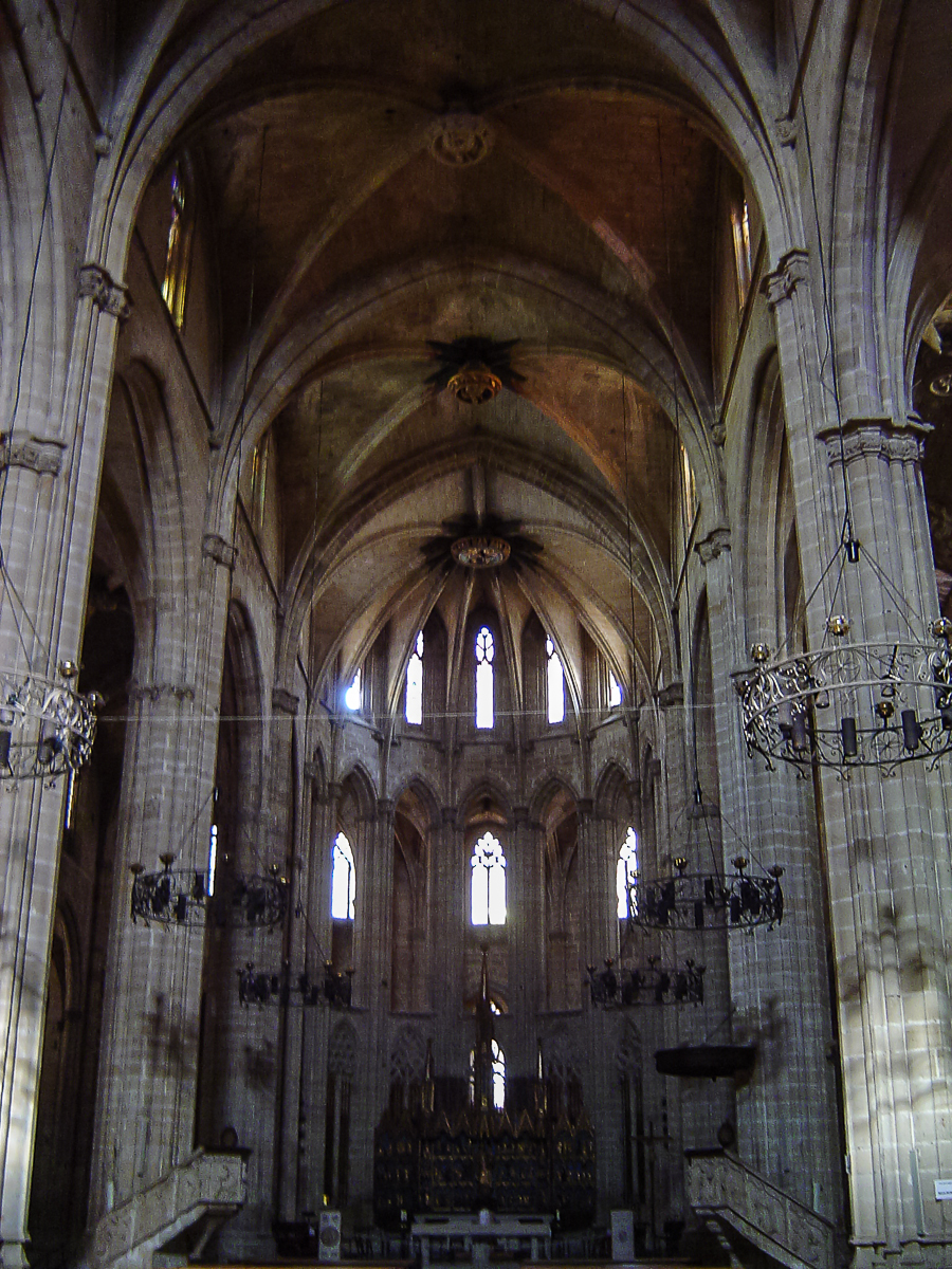 CATEDRAL DE TORTOSA 22082003 175342 00004.jpg